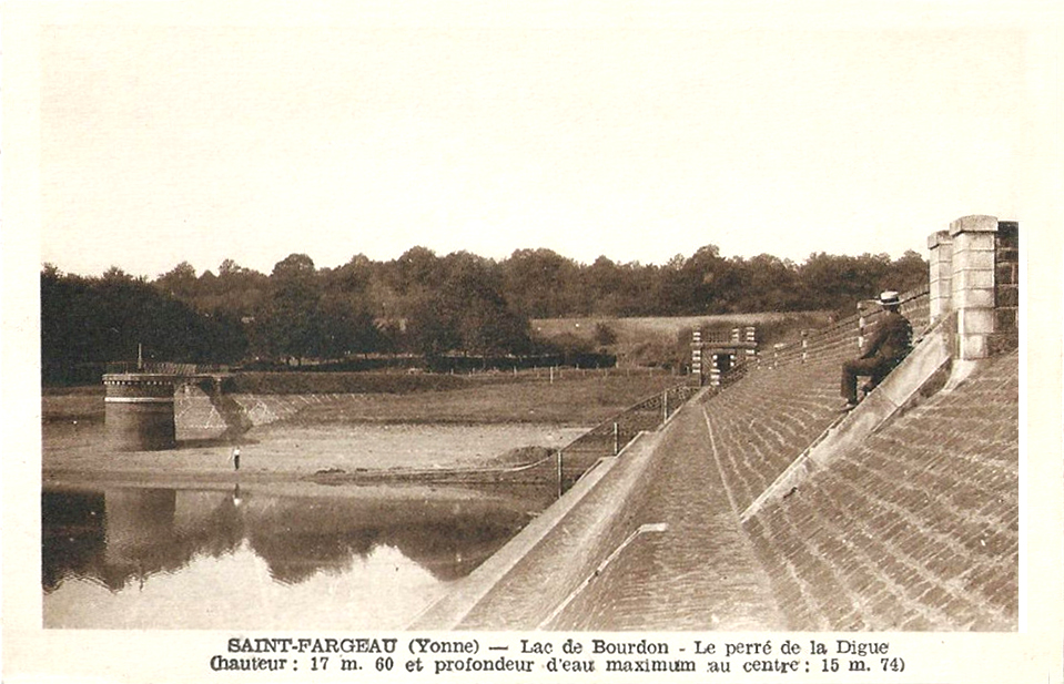 Perré en pierres maçonnées, à forte pente et à plusieurs degrés.